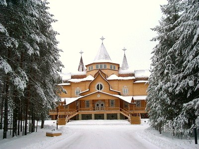 Дом Деда Мороза из клееного бруса сконструирован и реализован специалистами Сокольского ДОКа. Располагается в г. Великий Устюг Вологодской области, Россия. Является официальной резиденцией Деда Мороза.